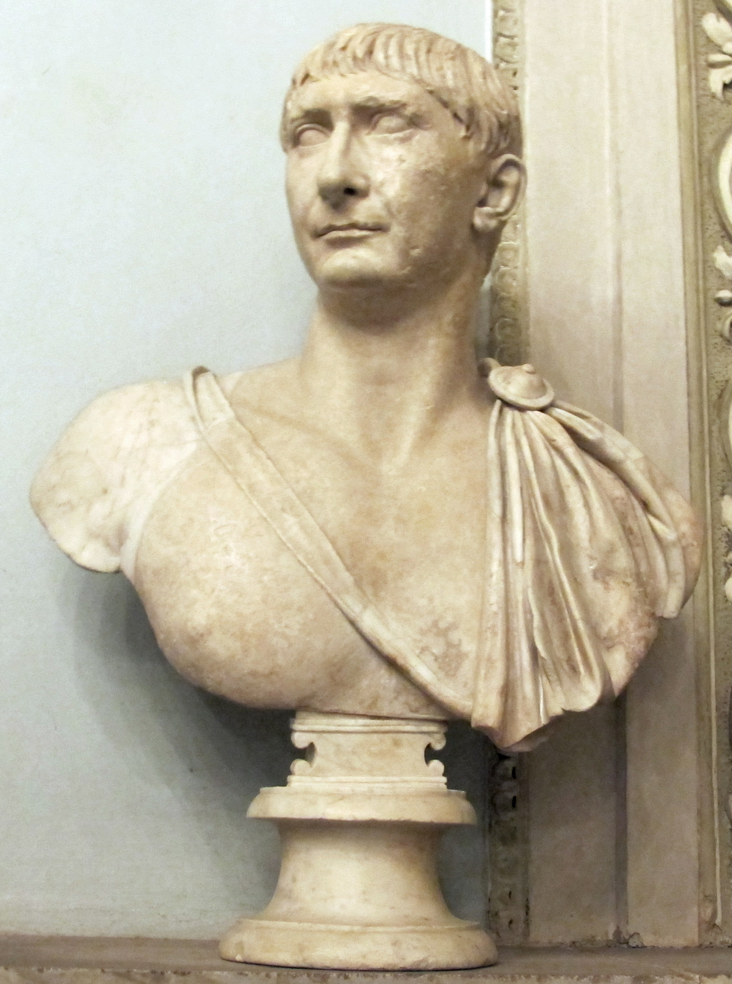 Traiano. Marmo grechetto, altezza totale 74 cm (senza piede e sostegno 58 cm). Proveniente dalla collezione Albani. Età traianea (107-108 d.C.). Roma, Musei Capitolini, Palazzo Nuovo, inv. S 276